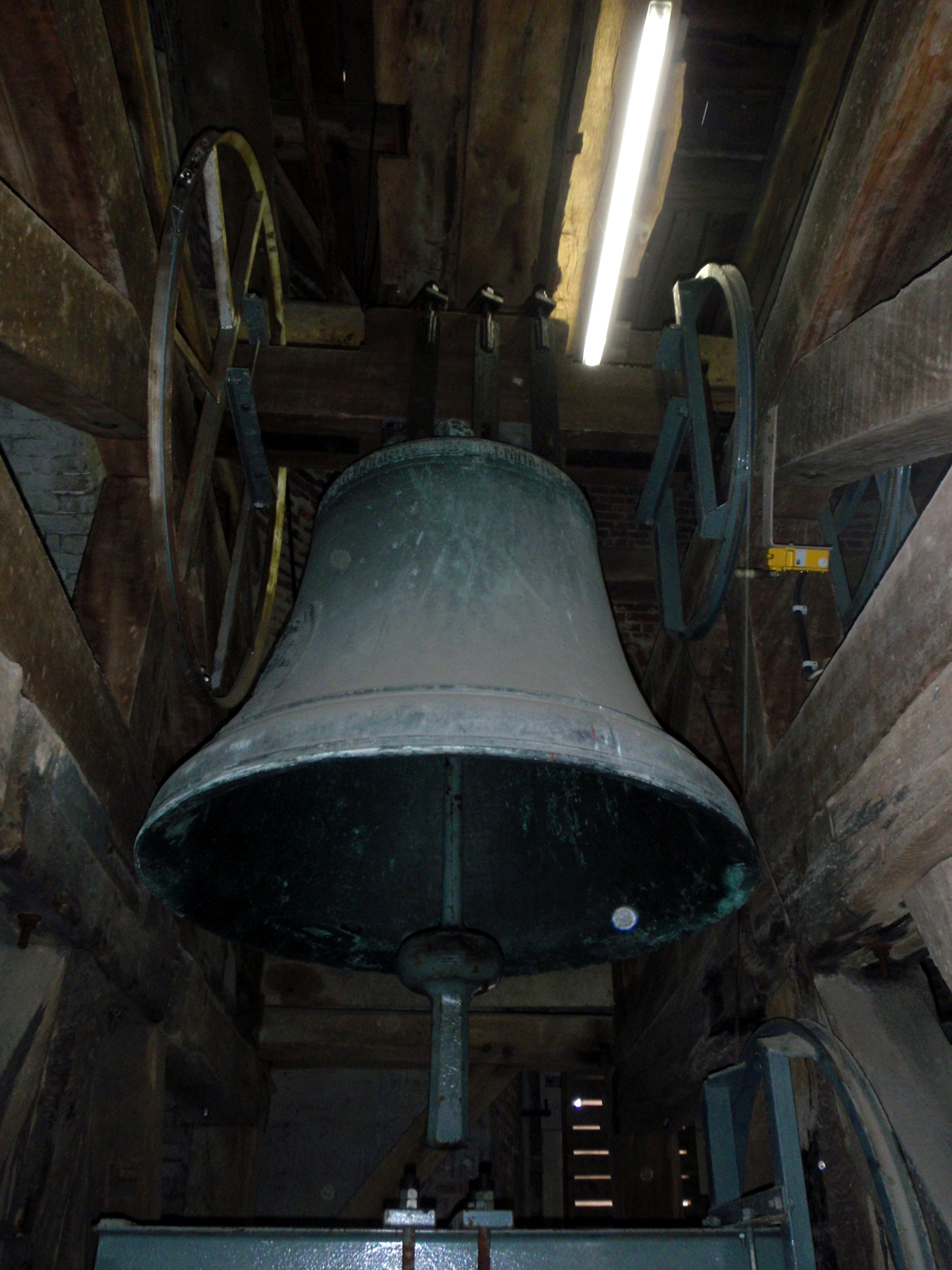 Die 2000 kg schwere "Lambertusglocke" (Ton C) der Coesfelder Lambertikirche. St. Lamberti am Marktplatz beherbergt in seinem 68m hohen Turm das älteste erhaltene Geläut Westfalens. Weitere Glocken sind "Maria" (Es, 1700 kg), "Heilig Kreuz" (F, 810 kg) und "Katharina" (G, 670 kg). Von 1928 bis 1942 komplettierte die "Christkönig" genannte Glocke das Geläut. Sie wurde im Krieg für die Rüstung eingeschmolzen.